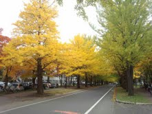 日本国北海道札幌市にある北海道大学構内の公孫樹並木